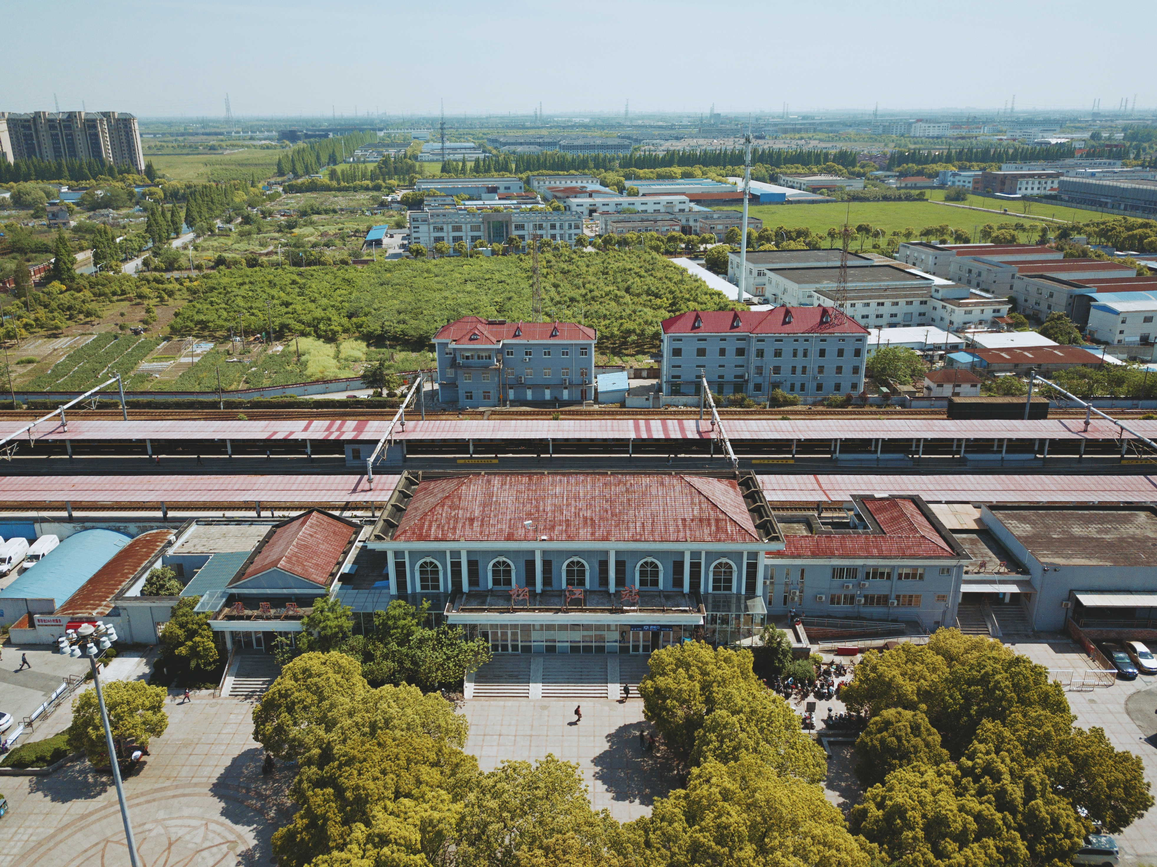 中文（中国大陆）: 松江火车站